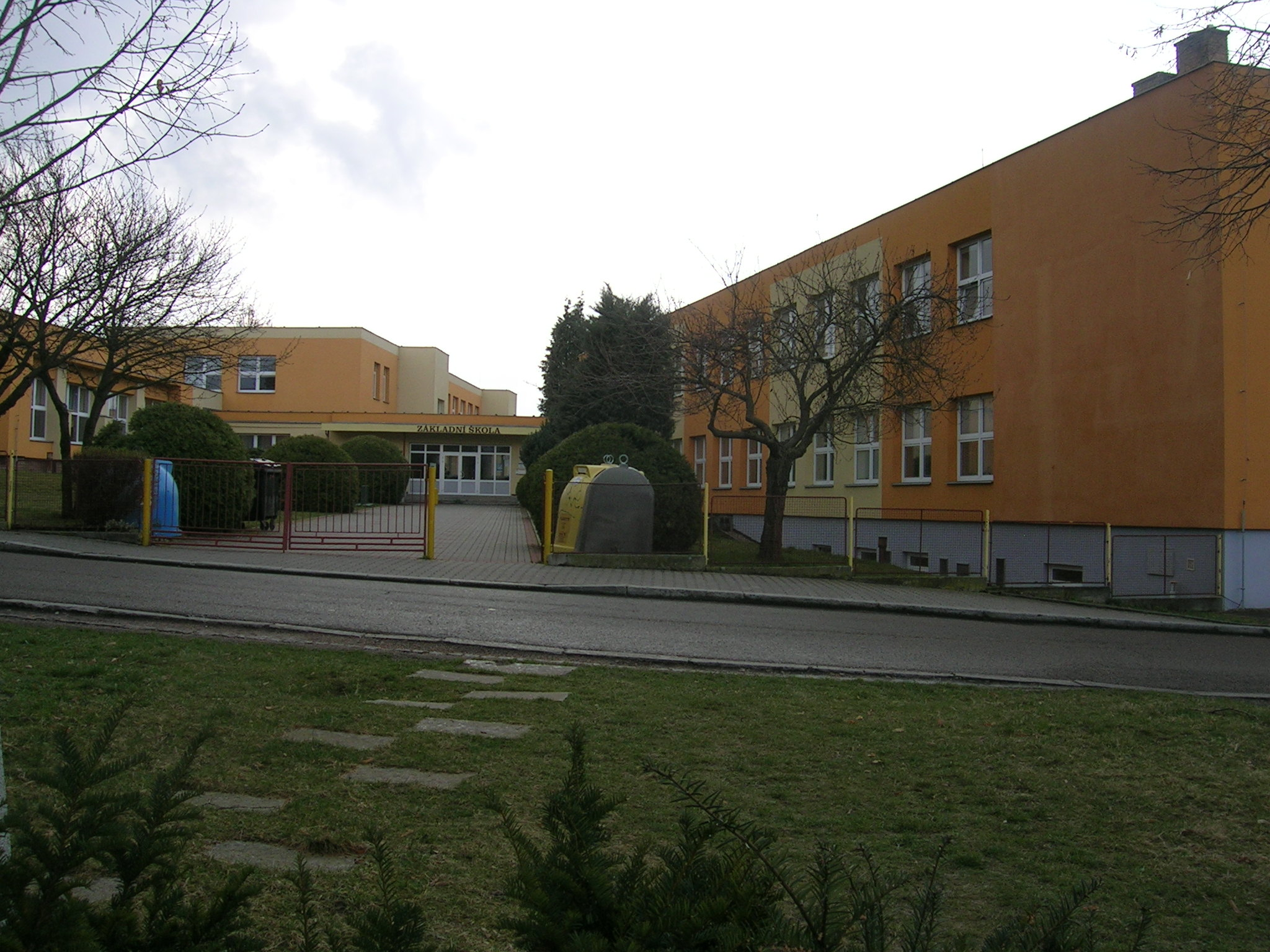 Základní škola Hrádek u Rokycan